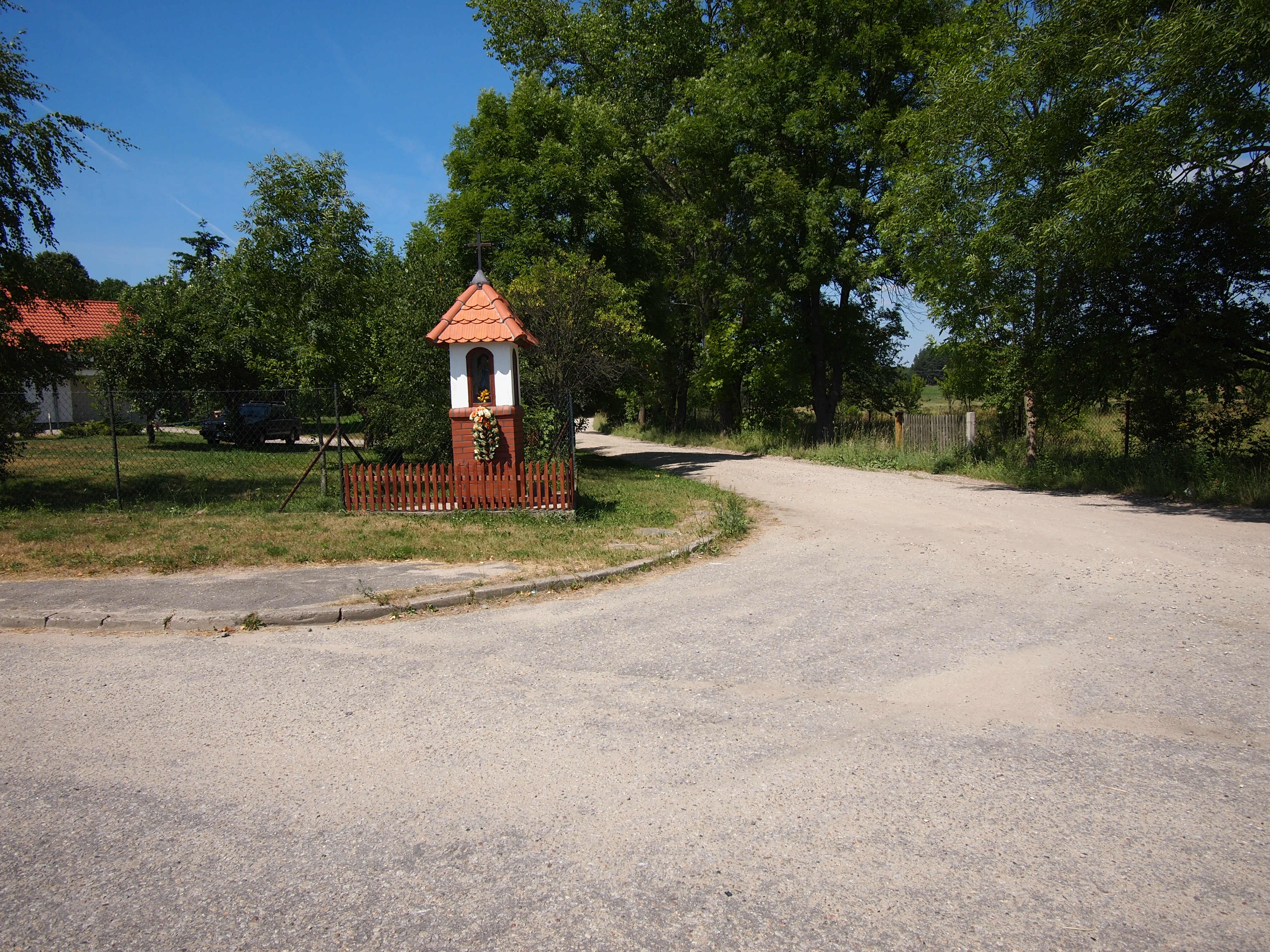 Czapielsk - kapliczka przydrożna przy skrzyżowaniu ulic Słonecznikowej i Fiołkowej